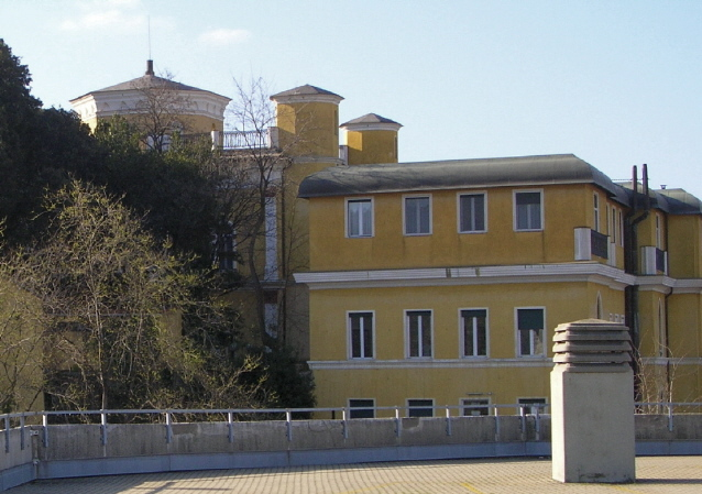 Foto propria Veduta Villa Pastorino (castello di Bolzaneto) Marzo 2008